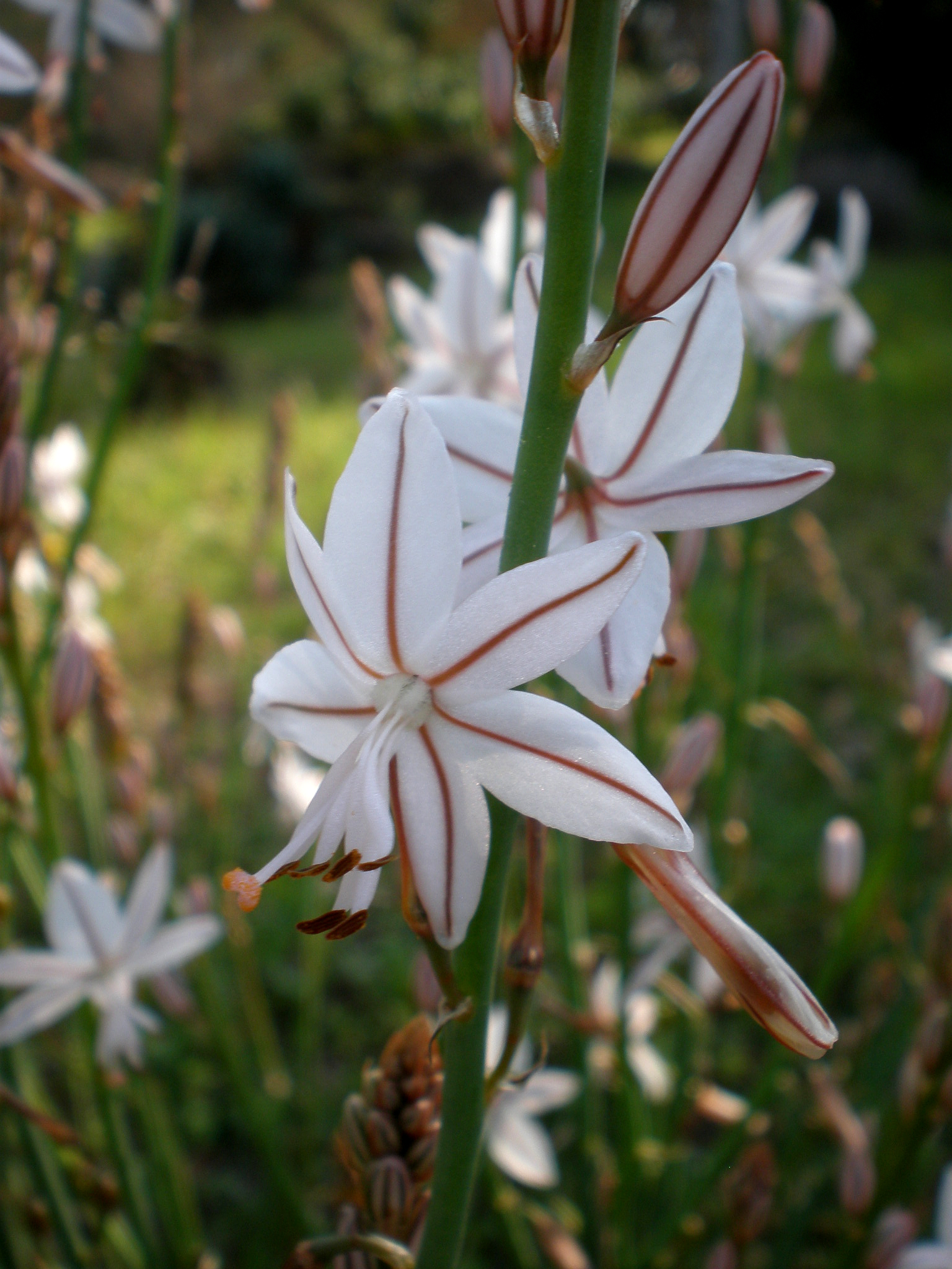 Jardín Botánico de Barcelona.